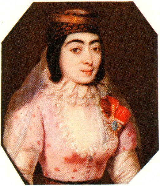 Грузинская царевна Елена Отаровна, ур. княжна Амилахвари (1783 – 1866), жена грузинского царевича Теймураза Георгиевича Багратиона-Грузинского (1782 – 1846).